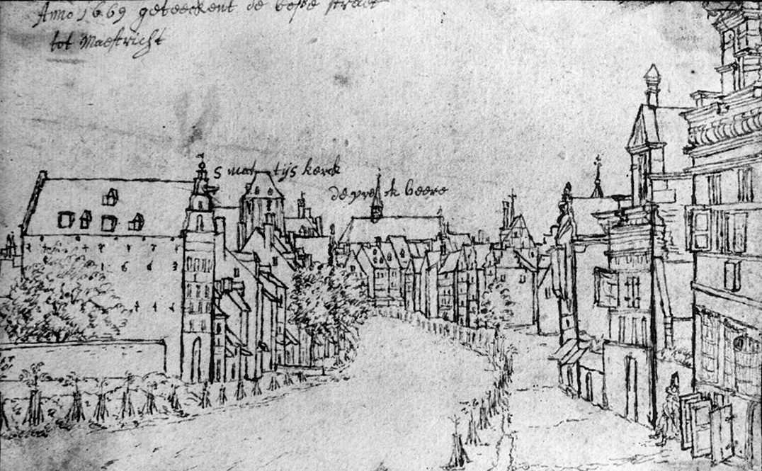 (1669) reproductie van tekening in bezit van Gemeente Archief